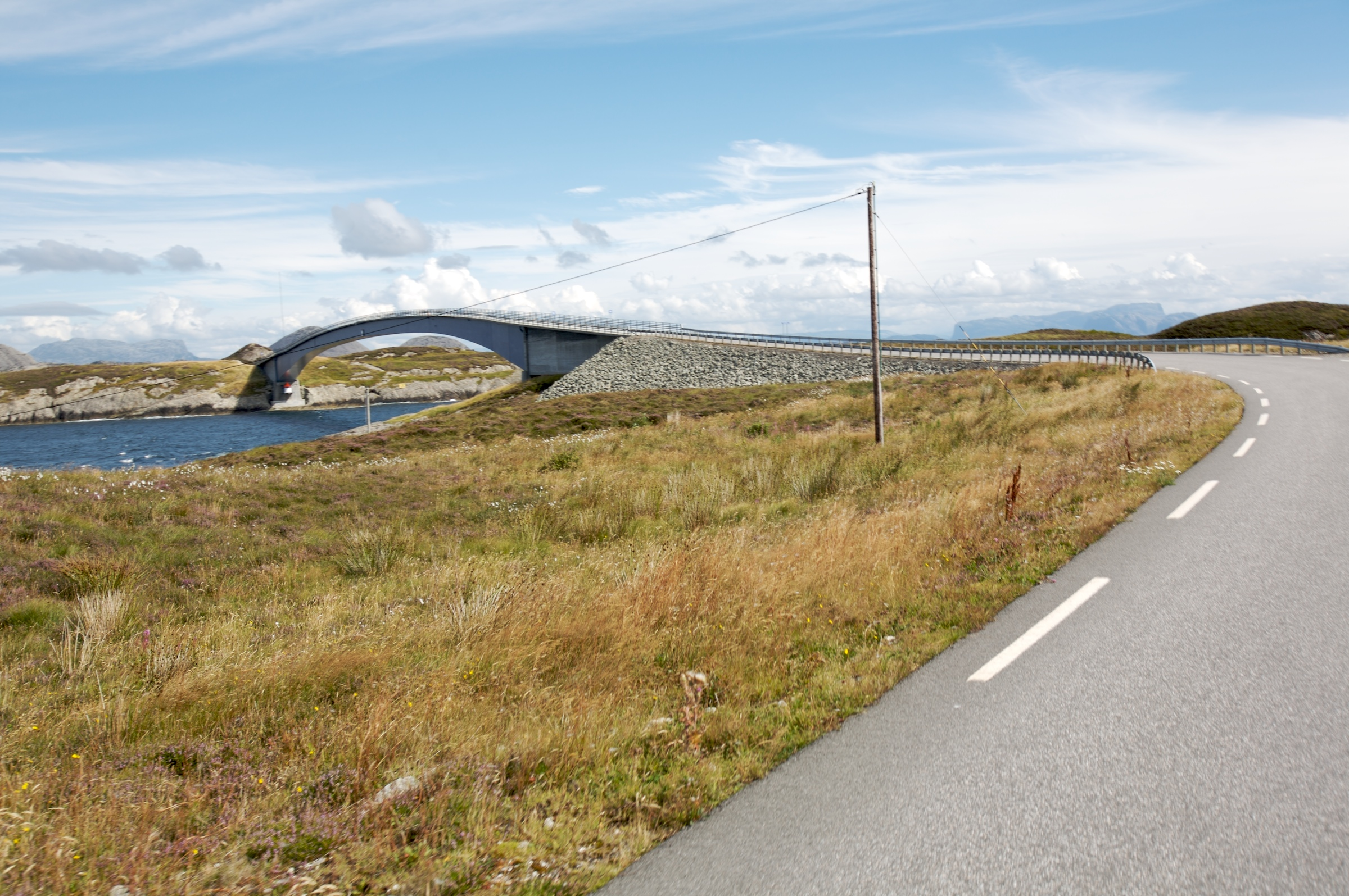 Bridge over Olssundet Bulandet/Værlandet in Askvoll, Sogn og Fjordane, Norway The road is Fylkesveg 365 i Sogn og Fjordane